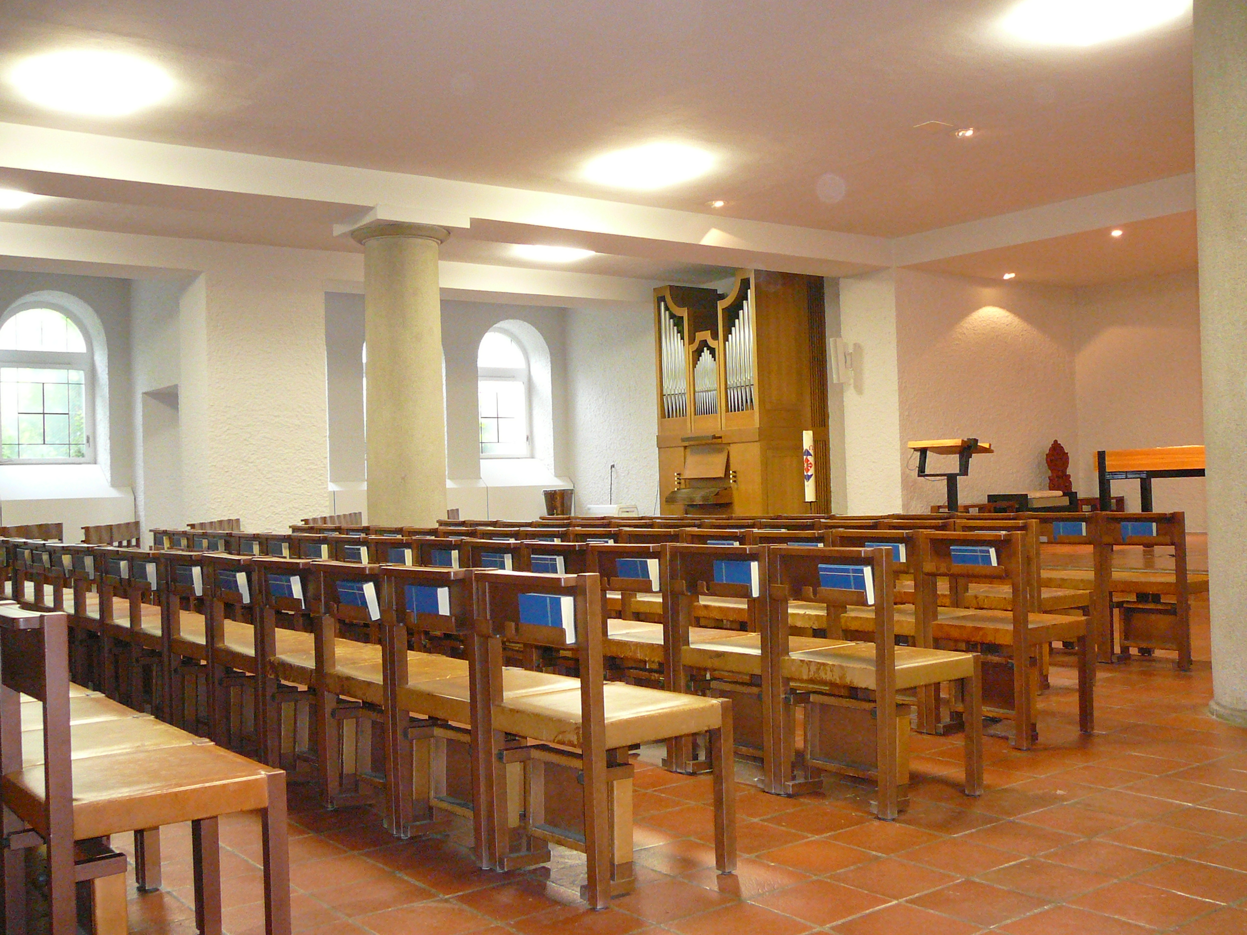 Römisch-katholische Pfarrkirche Guthirt, Zürich, Krypta